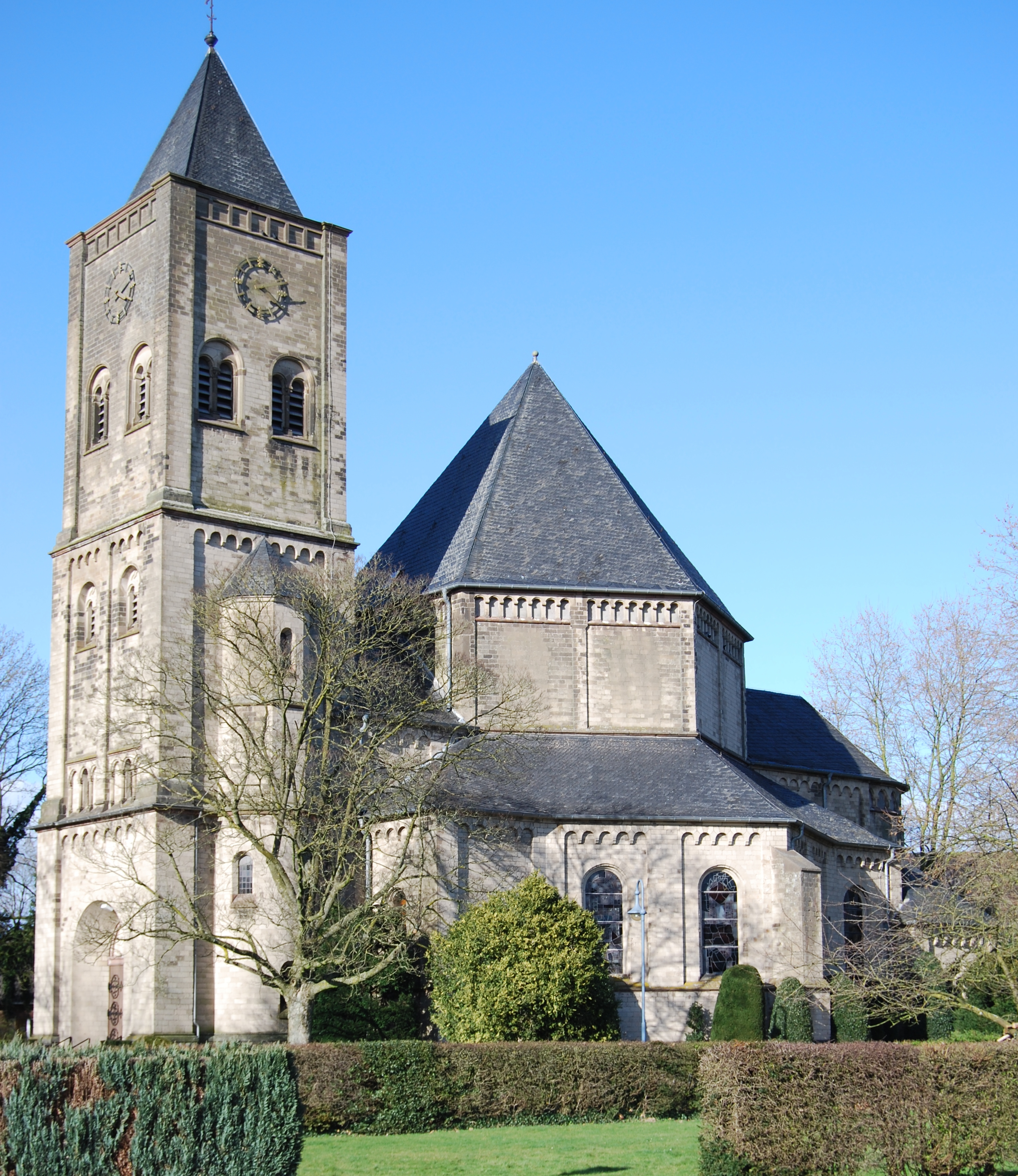 Goch-Asperden, Church St. Vincentius